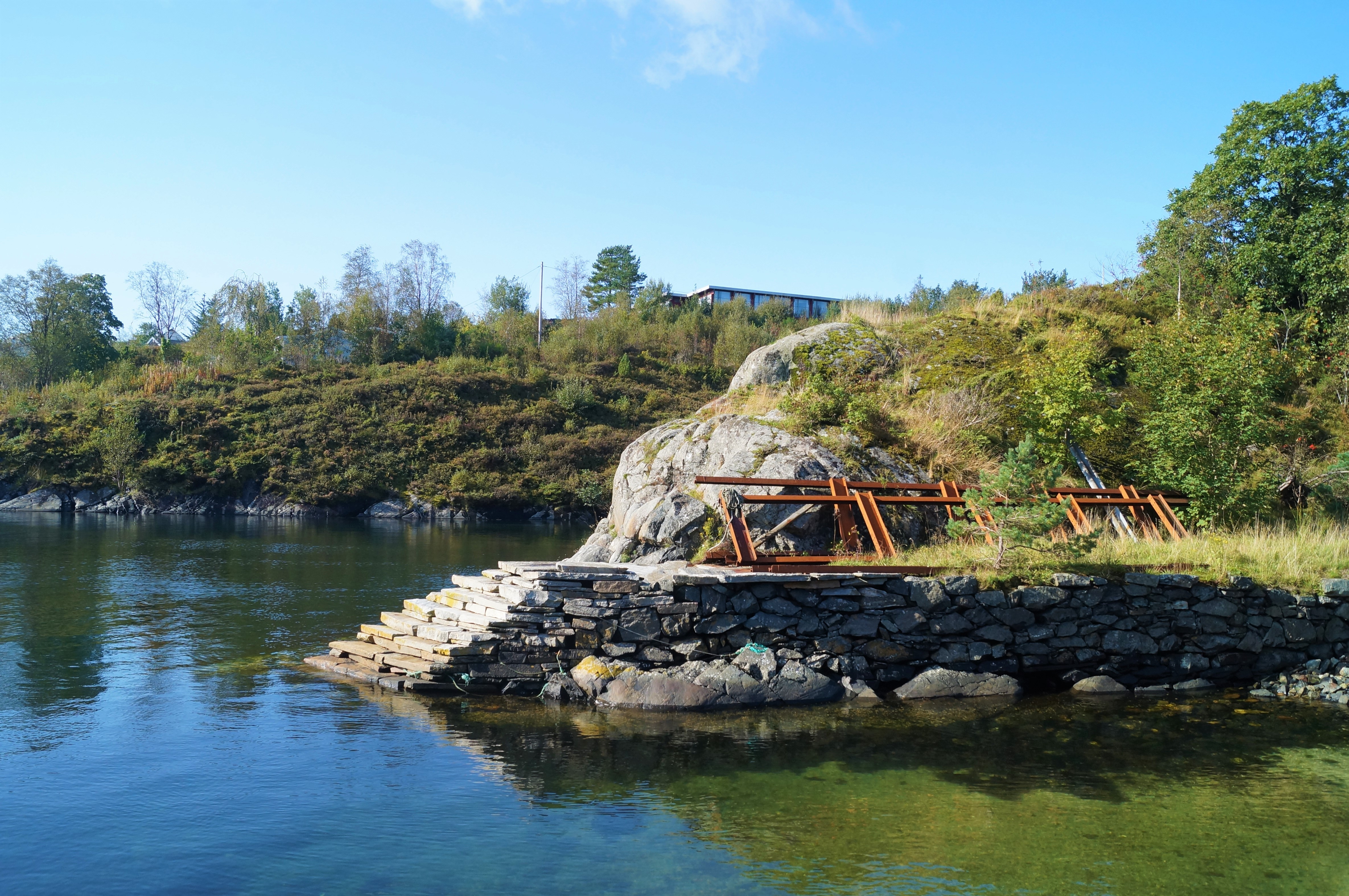 Kirkebrygge i Limavågen